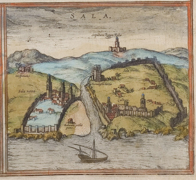 Salé